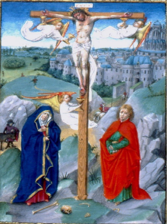 Vroeg werk van de Meester van Evert Zoudenbalch, getijdenboek Jan van Amerongen, 1460 (Brussel, Koninklijke Bibliotheek, Ms.II 7619).